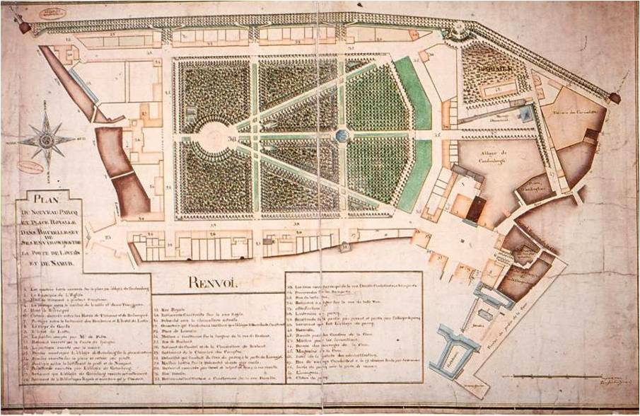 Joachim Zinner, Plan pour la place royale et le Parc, 1780. Bruxelles, Archives Générales du Royaume